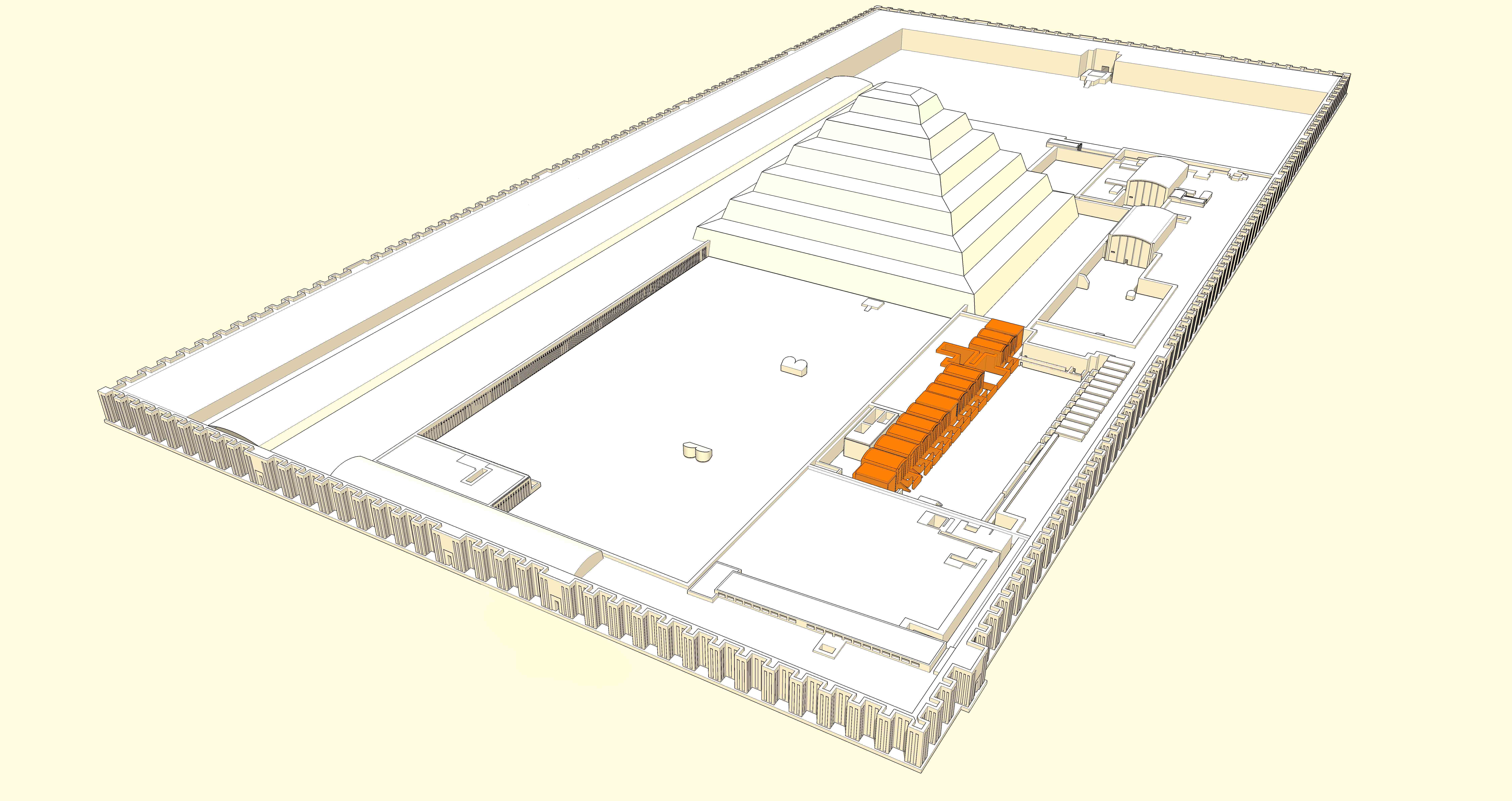 Position des chapelles de la cour du heb-sed dans le complexe de Djoser